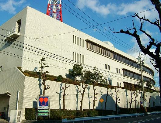 名古屋市昭和区高峯町に所在する中京テレビ放送の旧本社屋。本社ビルの周りは急勾配な坂道が続いている。